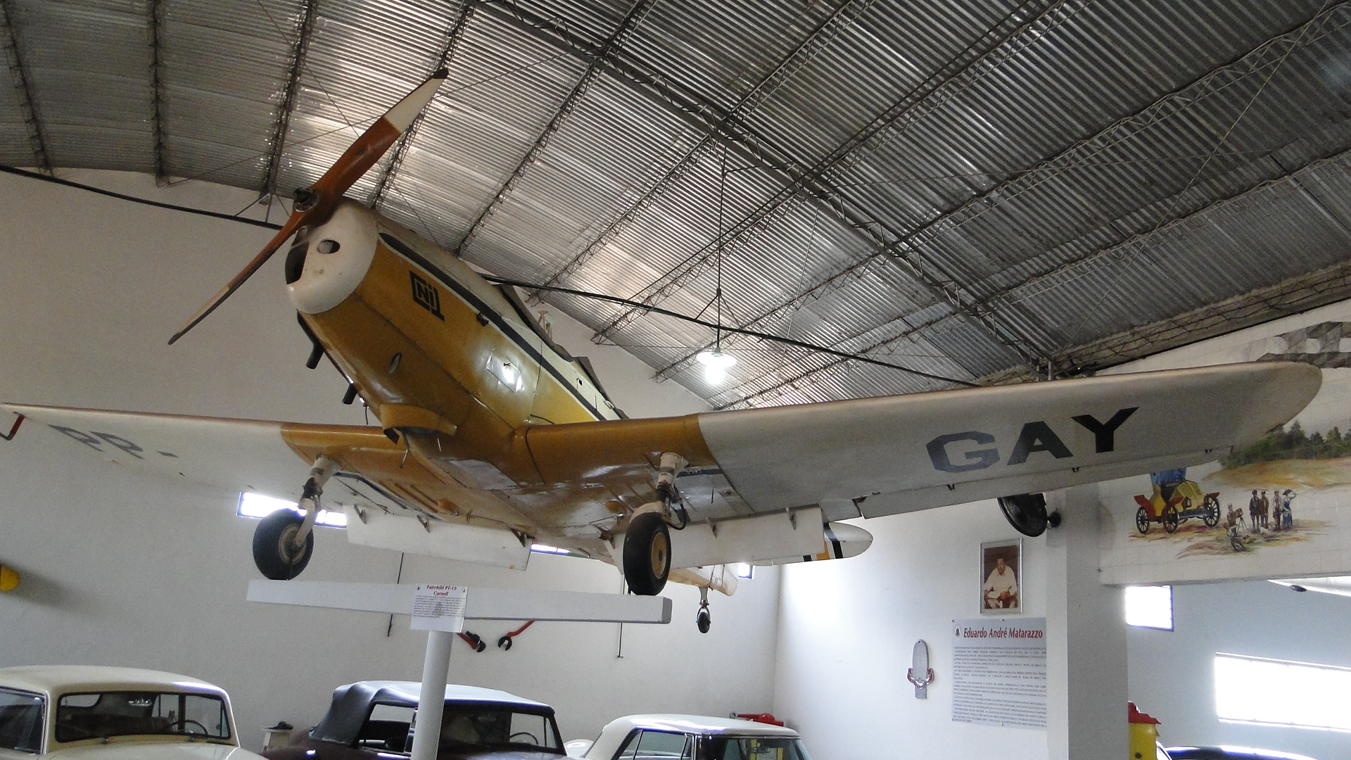 Avião Fairchild PT-19, série 260-A, prefixo PP-GAY. Acervo do Museu de Armas, Veículos e Máquinas Eduardo André Matarazzo, localizado na cidade de Bebedouro, SP, Brasil. Doado pelo Ministério da Aeronáutica em 1975.